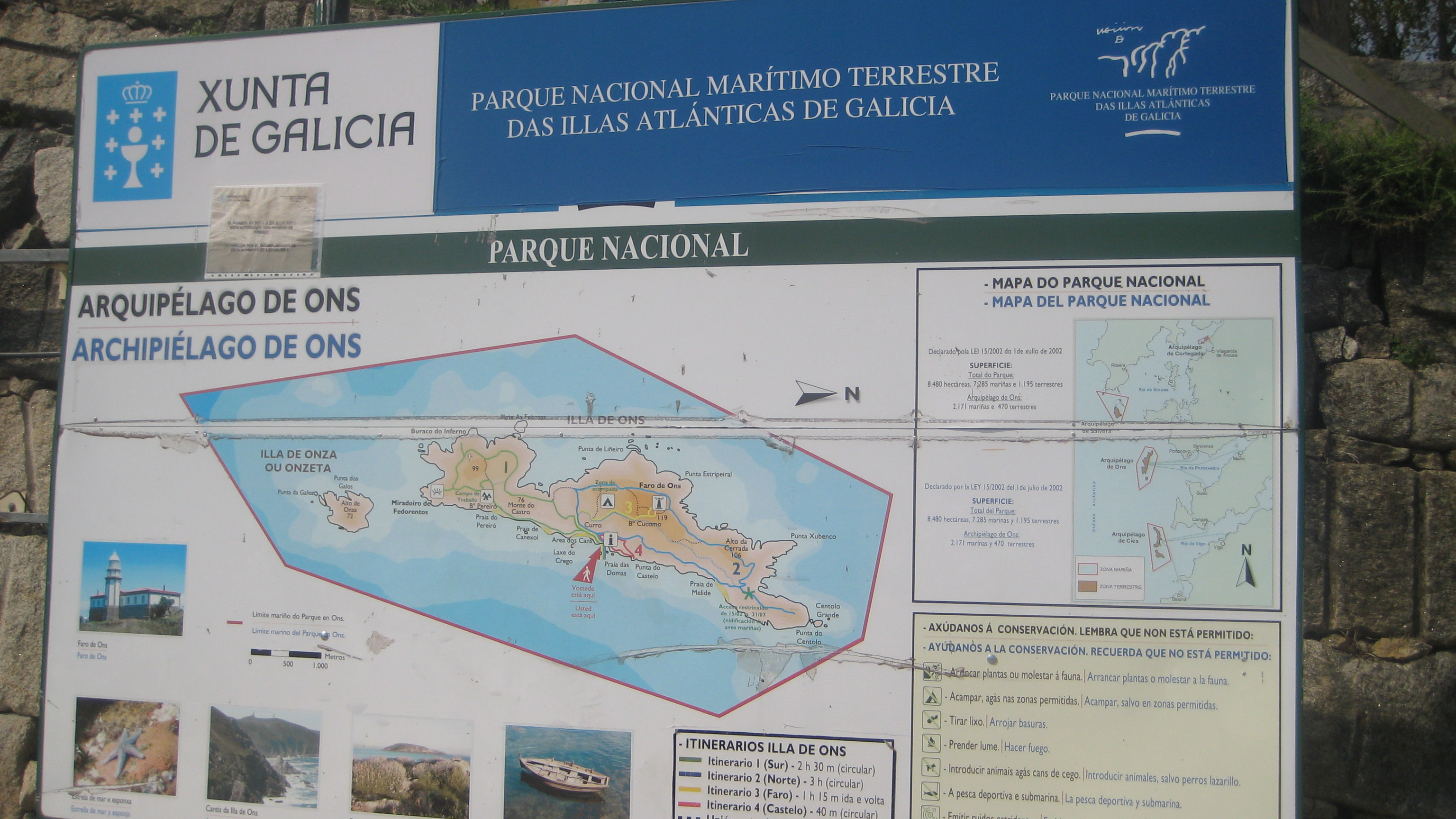 Cartel e plano da illa de Ons, Galicia, España.